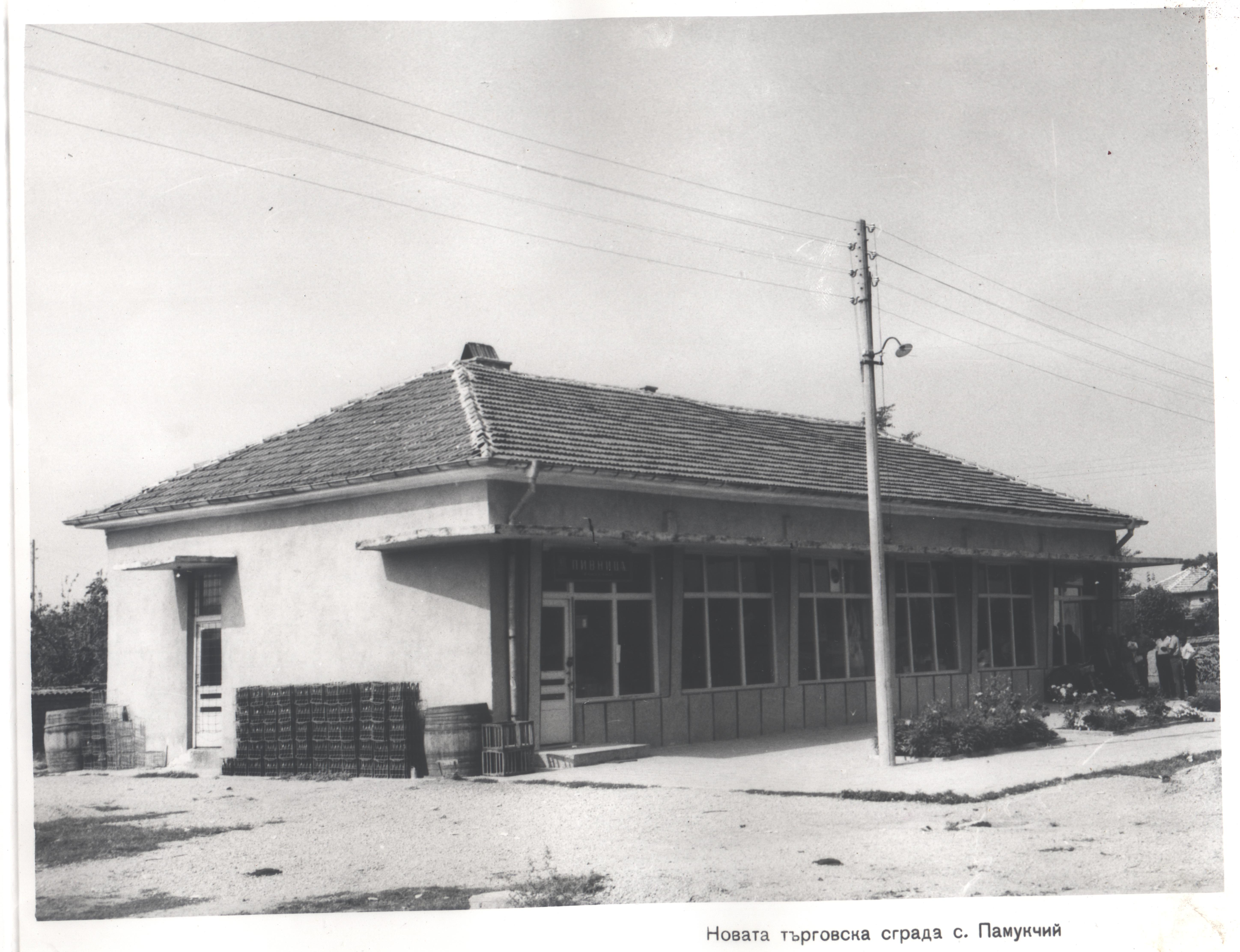 Ресторанта в село Памукчий